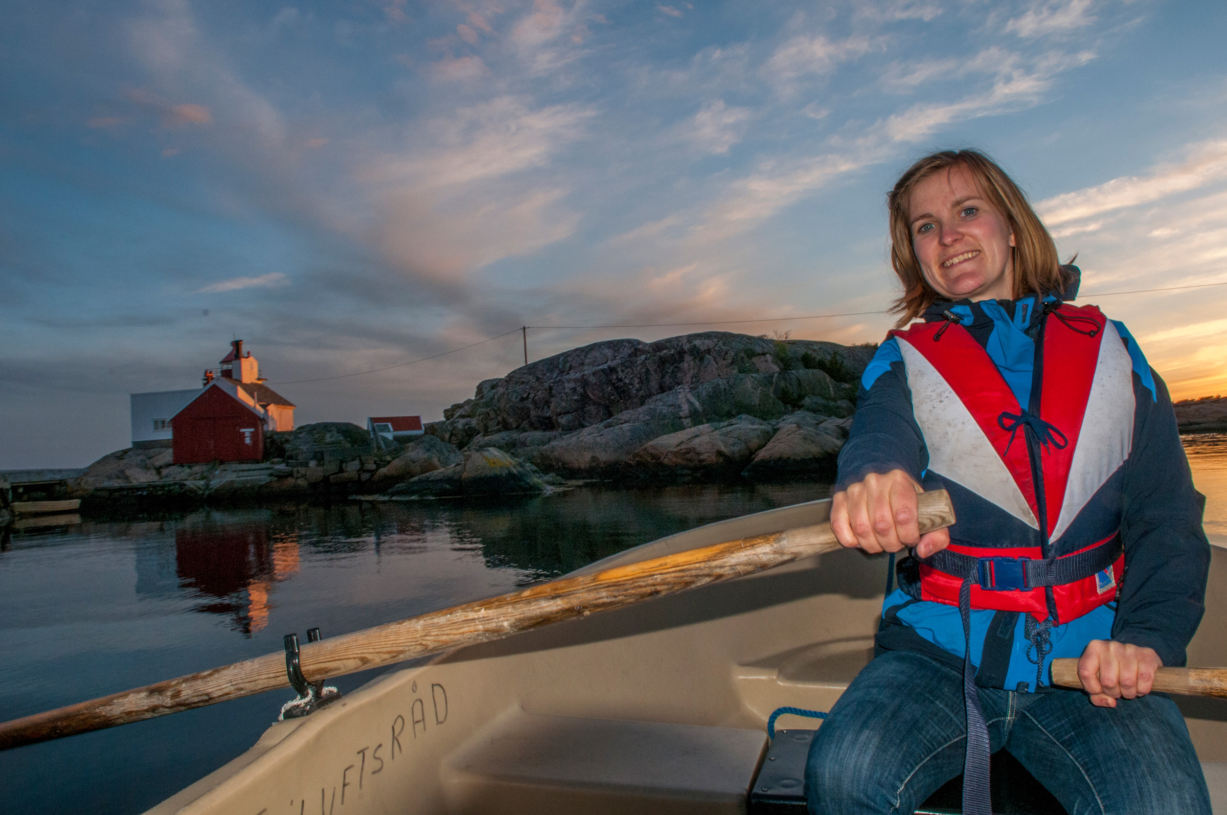 Homlungen fyr er en del av kystleden i Oslofjorden